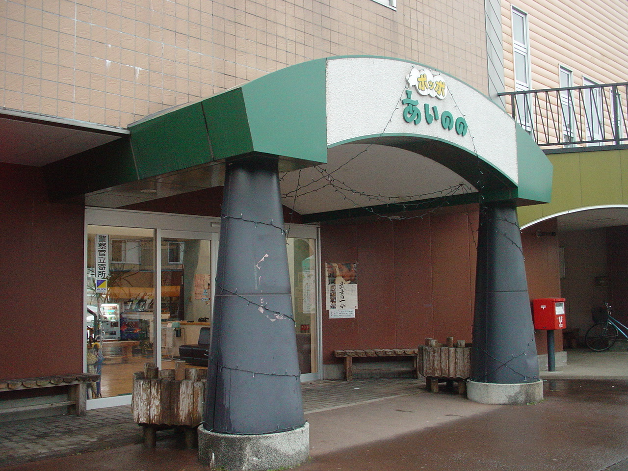 （相野々駅）